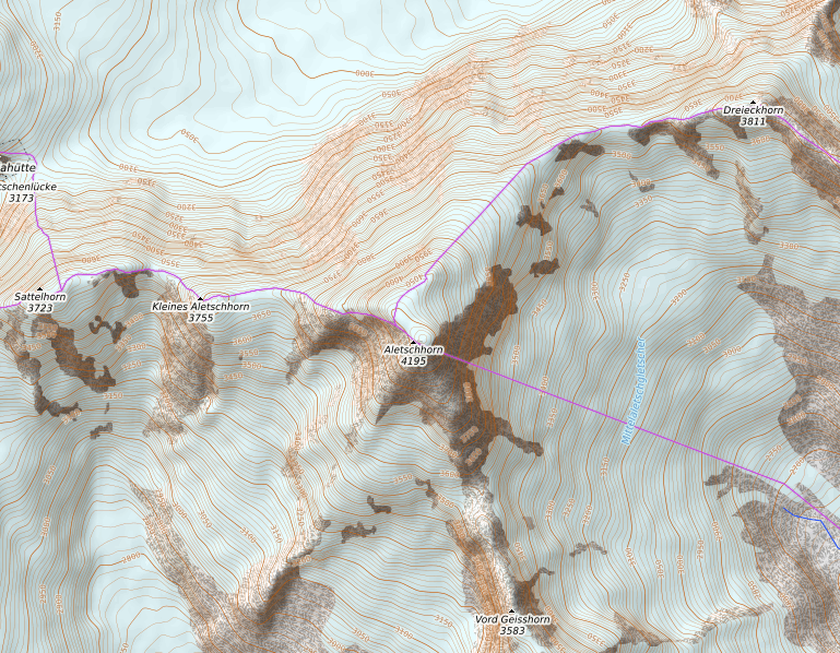 carte réalisée sur umap This map may be incomplete, and may contain errors. Don't rely solely on it for navigation.